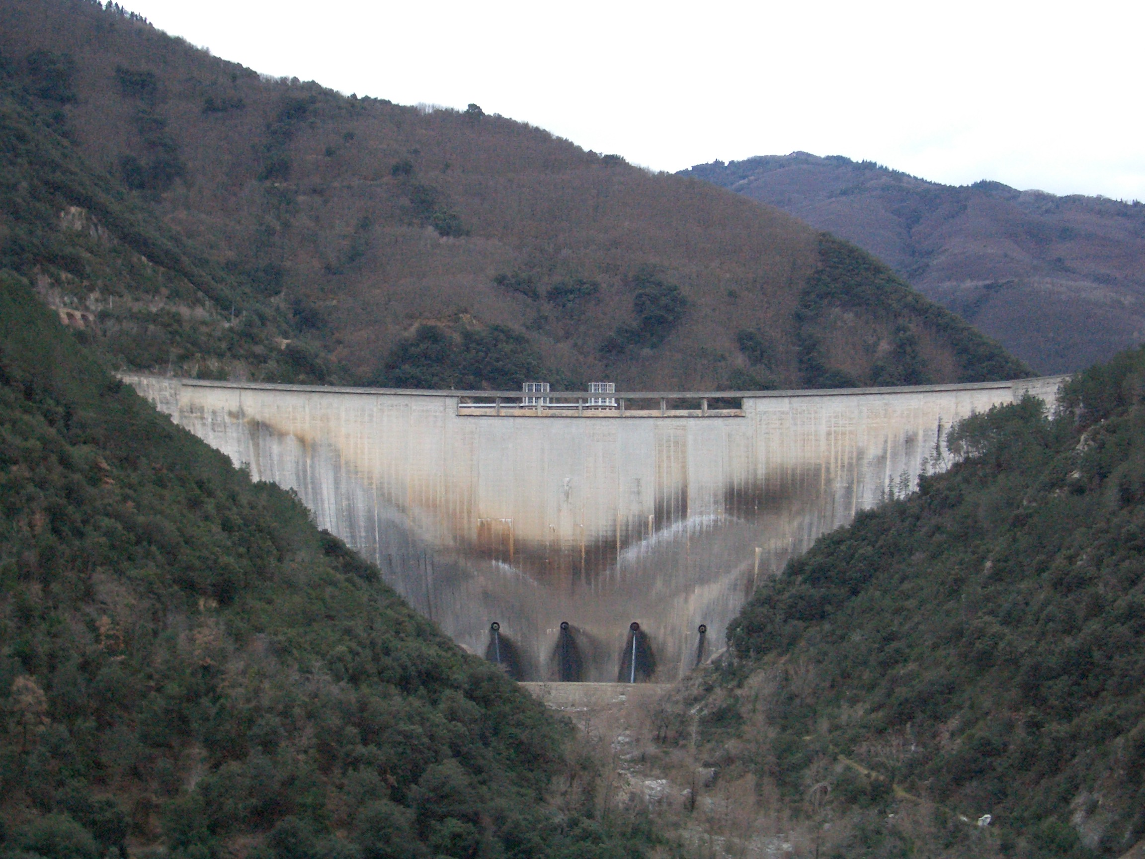 Pantà de Susqueda